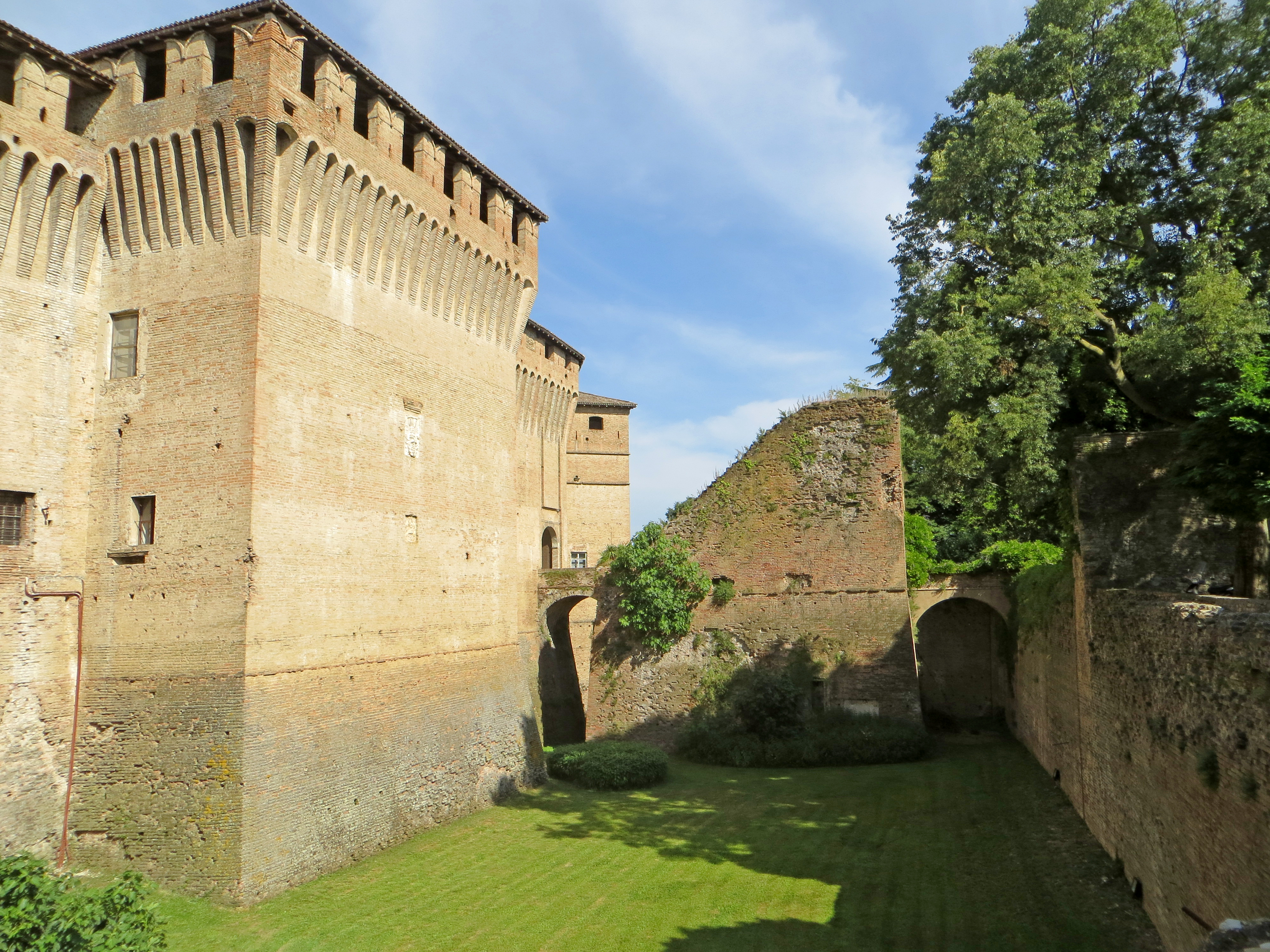 Castello (Montechiarugolo) - ala sud-ovest e rivellino sud